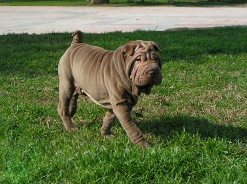 Alaine GingerPeis du Soleil d'Asie